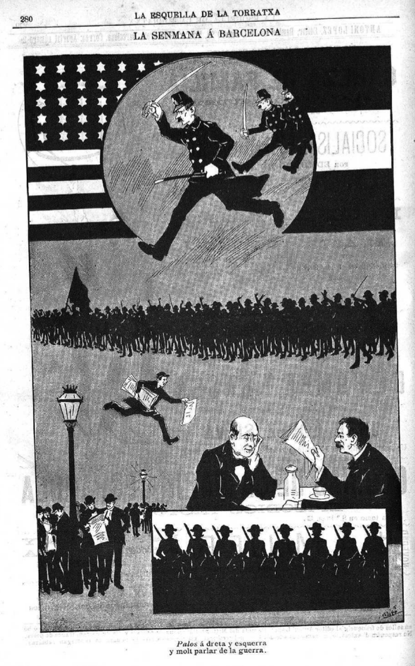 Página de la revista La Esquella de la Torratxa